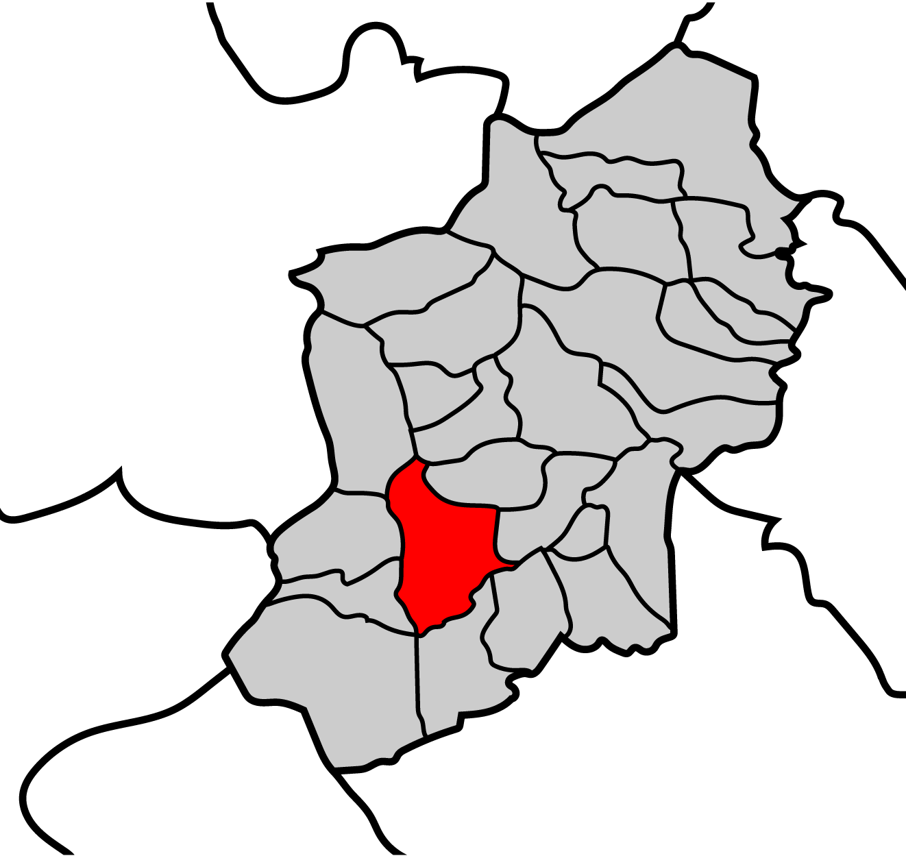 Mapa de la parroquia de Tortes ayuntamiento de Becerreá